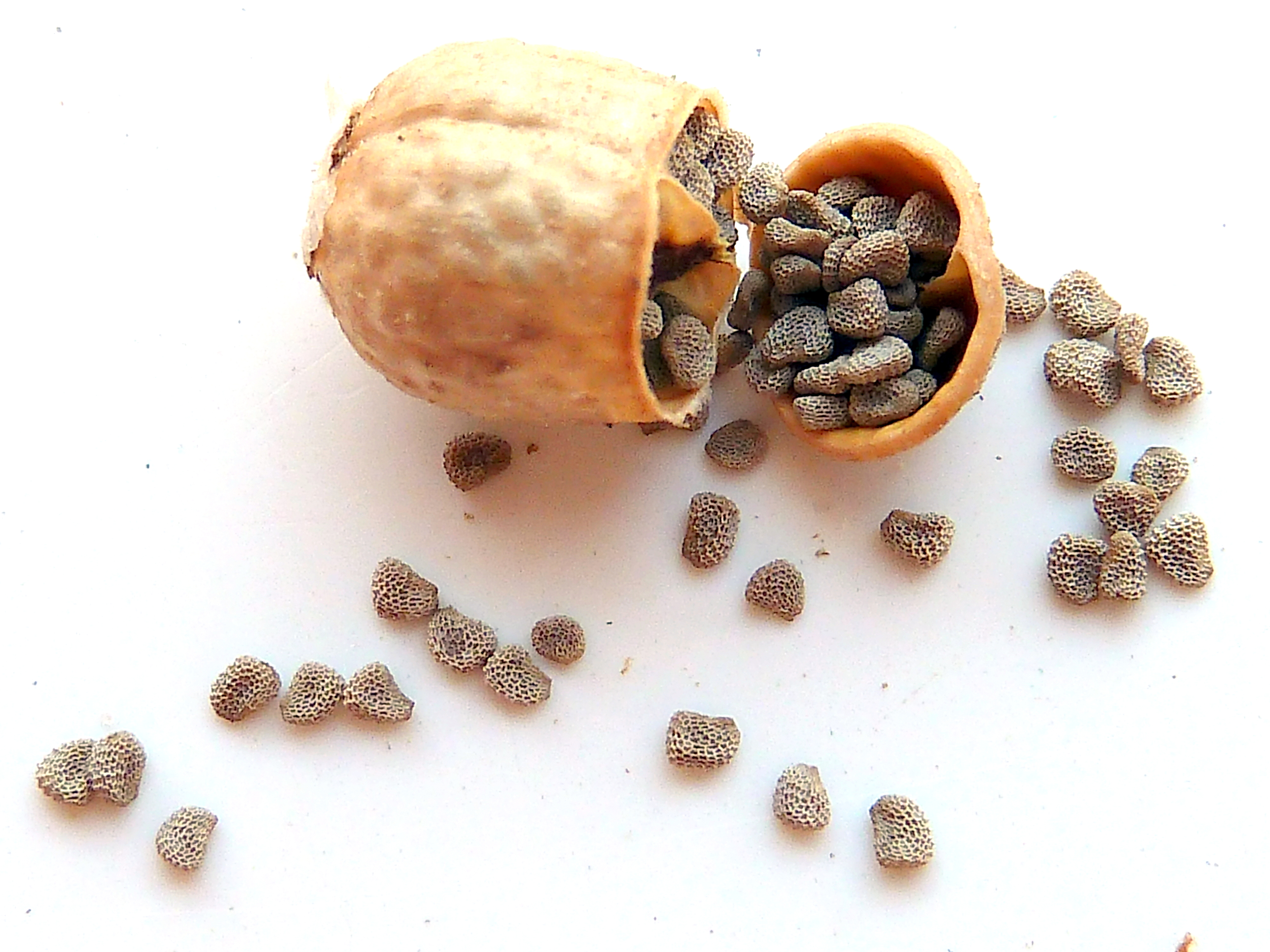 Hyoscyamus albus (Beleño) : pixidio con semillas - Calle del Puerto de Poniente, Águilas (Murcia, España).